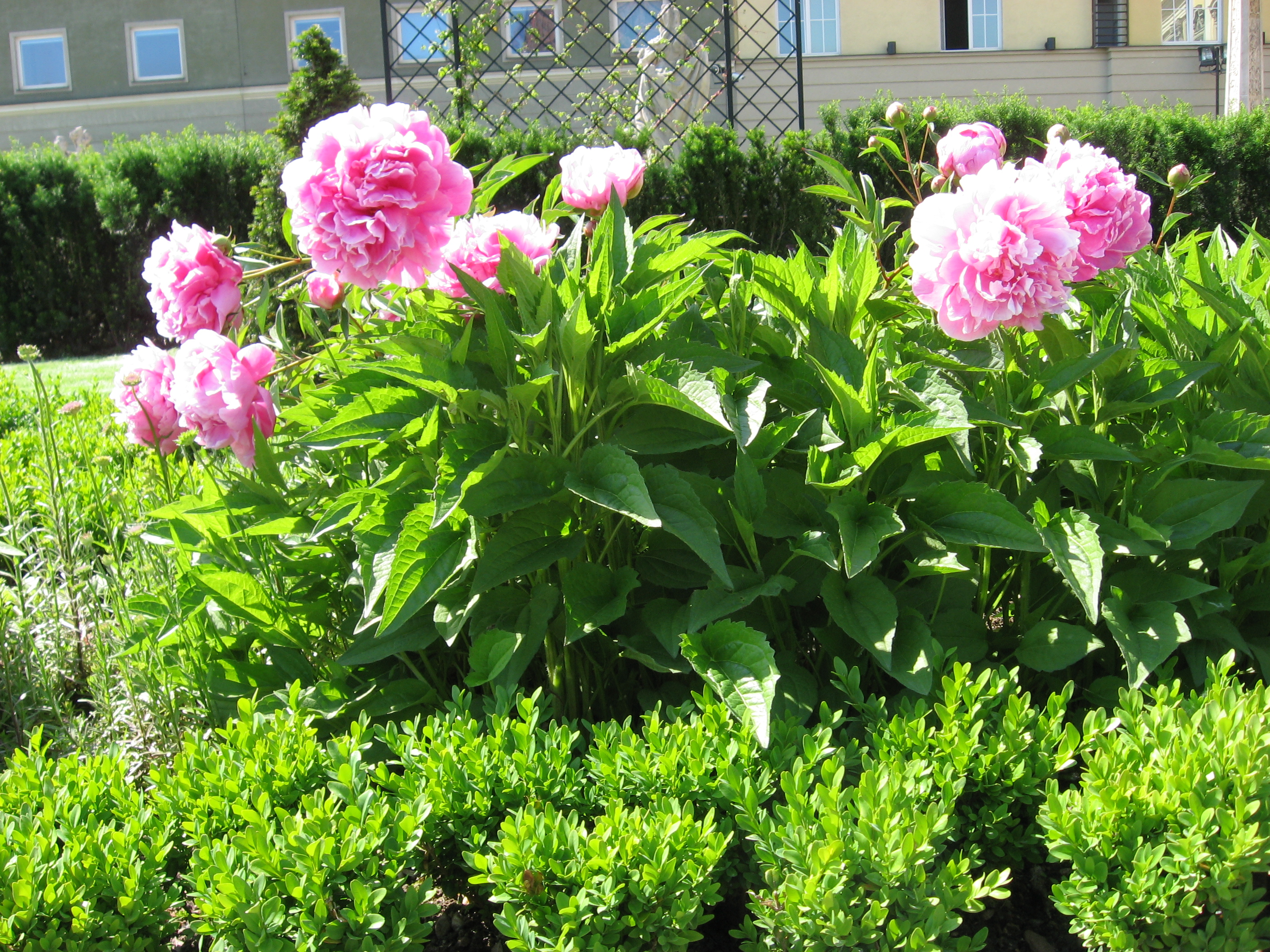 Ogród Barokowy przy Muzeum Miejskim Wrocławia